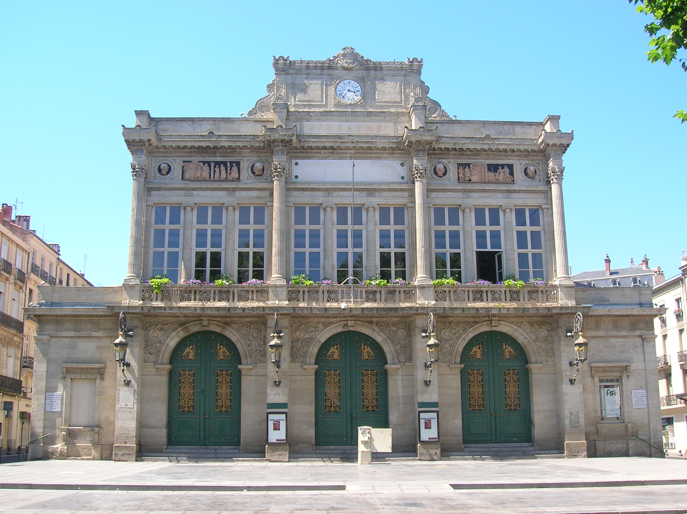 Béziers - Hérault - Grand-Théâtre (intérieur "bonbonnière à l'italienne"), actuellement appelé Théâtre Municipal, créé entre 1842-1844 par l'architecte Charles Isabelle, à l'extrémité des allées Paul Riquet. Bas-reliefs en terre cuite de David d'Angers. Façade néo-classique (au style grec), intérieur en bois. Capacité : environ 600 places. C'est le seul ouvrage de France datant de cette époque à avoir conservé son esthétique d'origine.